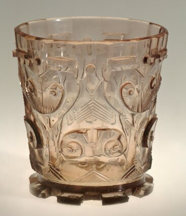 "Hedwigsglas", aus dem Besitz Martin Luthers Erweiterte Beschreibung Unbekannt Naher Osten (Syrien?) 11. Jh.? Höhe: 10,3 cm, Durchmesser: unten 8 cm, Durchmesser: oben 10 cm, Gewicht: 350 g – Material: Farbloses, leicht rauchtopas-stichiges Glas, geblasen, geschliffen und poliert Glas Martin Luther Die „Luther-Veste“. Martin Luther und die Reformation auf der Veste Coburg und in ihren Kunstsammlungen Die Veste Coburg als authentischer Luther-Ort und als Luthergedenkstätte Kunstsammlungen der Veste Coburg Kunstsammlungen der Veste Coburg Kunstsammlungen der Veste Coburg - Inventarnummer: a.S.00652 Metadaten-Lizenz: CC0